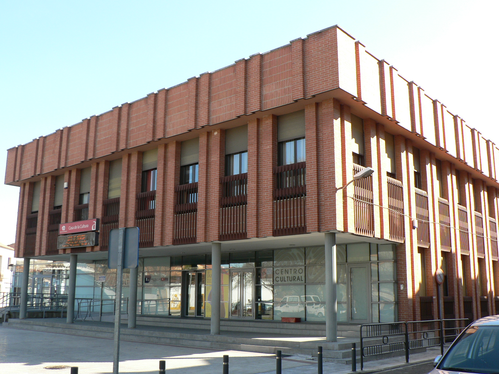 Azuqueca - La Casa de la Cultura y la Biblioteca Municipal.